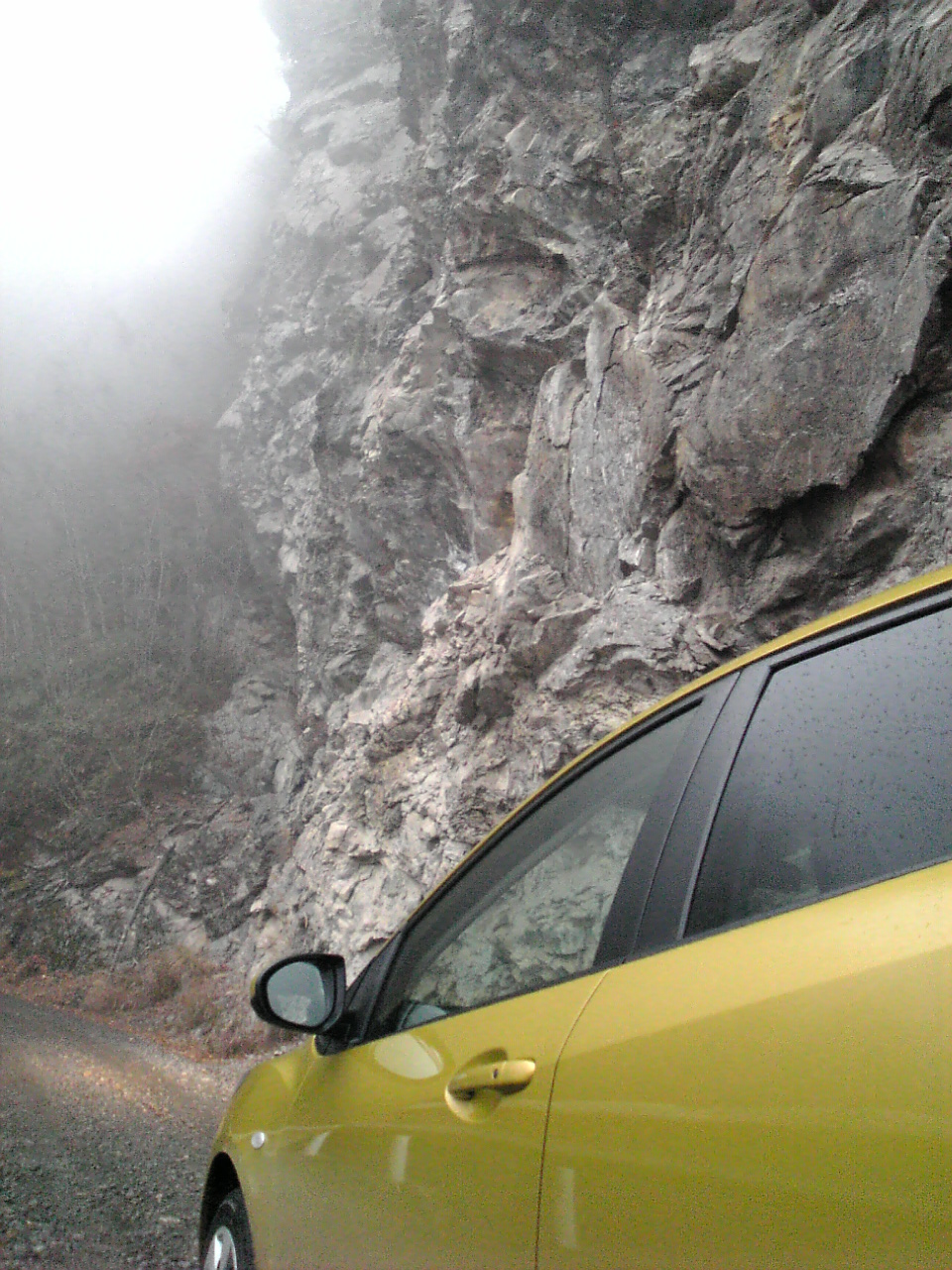 旧中津川林道